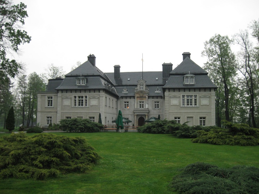 Miłków, ul. Wiejska 218 - pałac (zabytek nr rejestr. A/767/522/J)